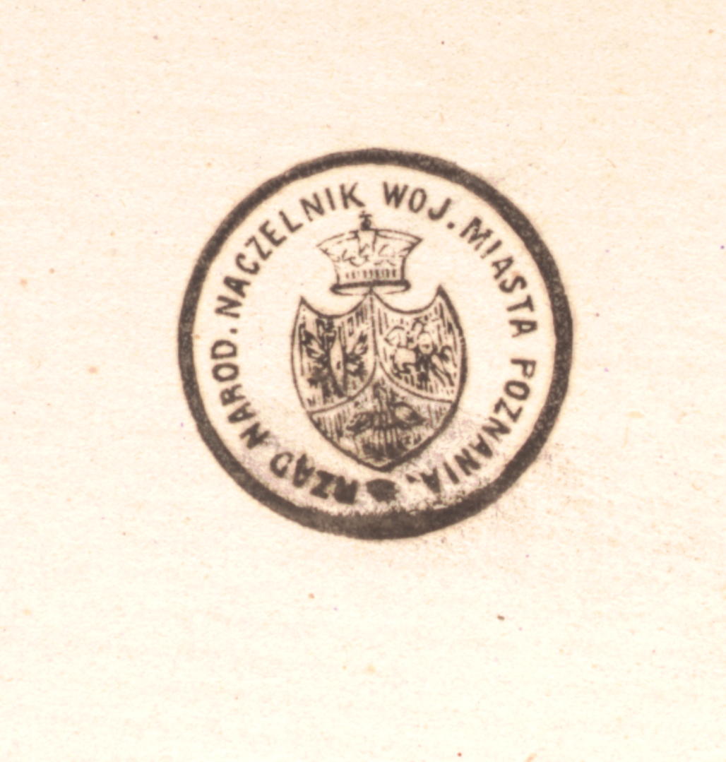 Odciski różnych pieczęci terenowych organów władz powstańczych (miasta Poznania, Organizacji Zaboru Pruskiego, województwa augustowskiego, województwa płockiego)